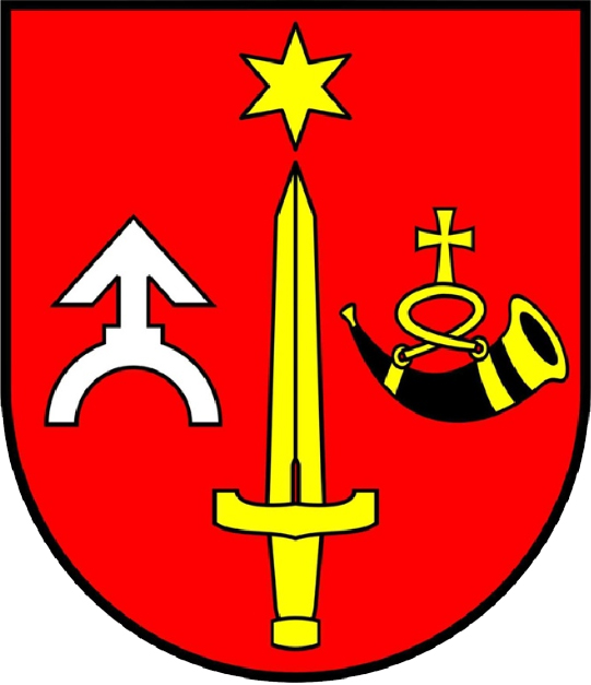 Herb gminy Wielgie • Coat of arms of gmina Wielgie